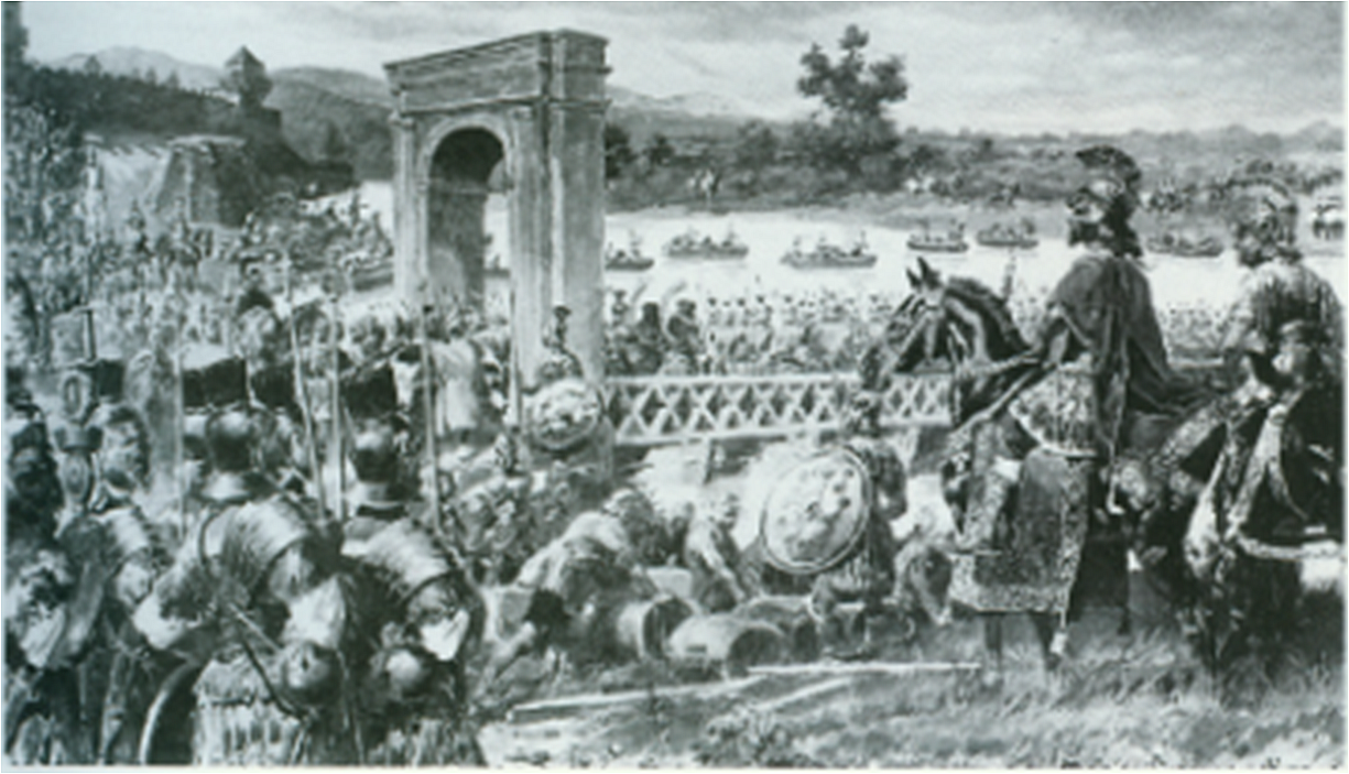 Marc Aurel überquert bei Vindobona die Donau. Darstellung aus dem späten 19. Jahrhundert.